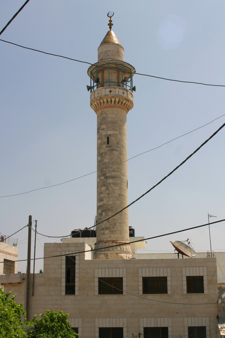 Moschee in Ramallah, Palästina. Object location31° 54′ 15″ N, 35° 11′ 45″ E